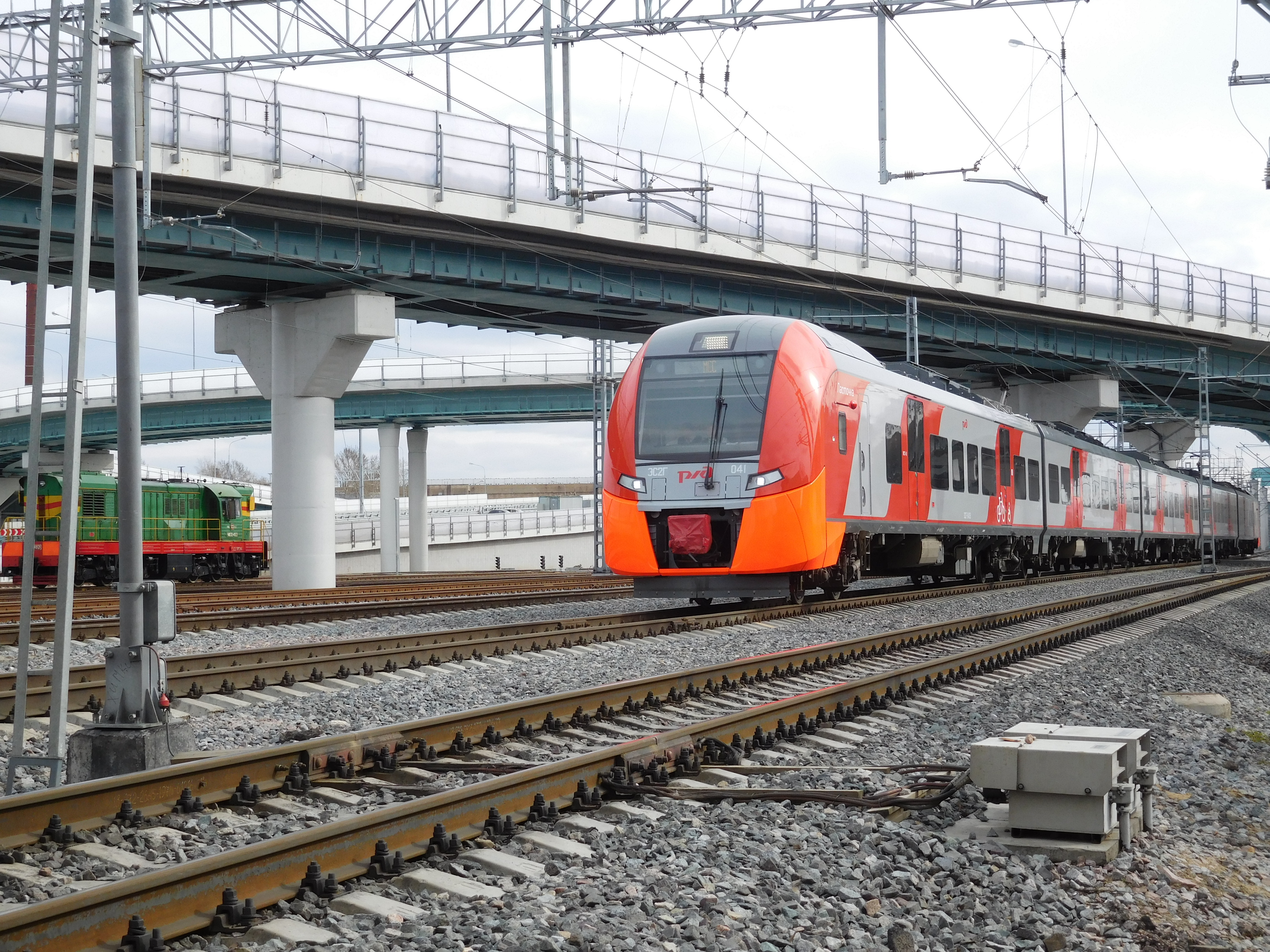 Станция Лефортово в 2017 году